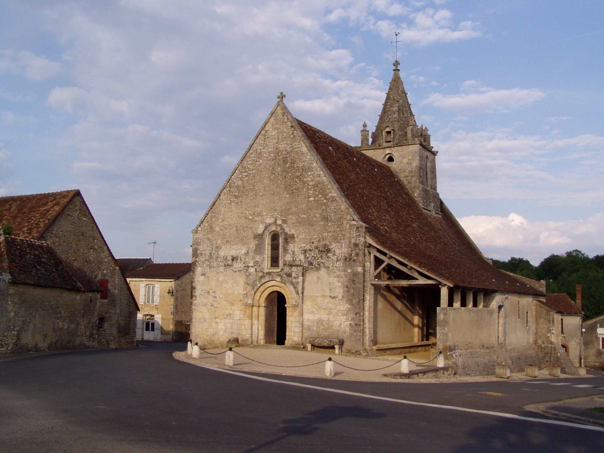 Eglise d'Antigny, département de la Vienne (France)